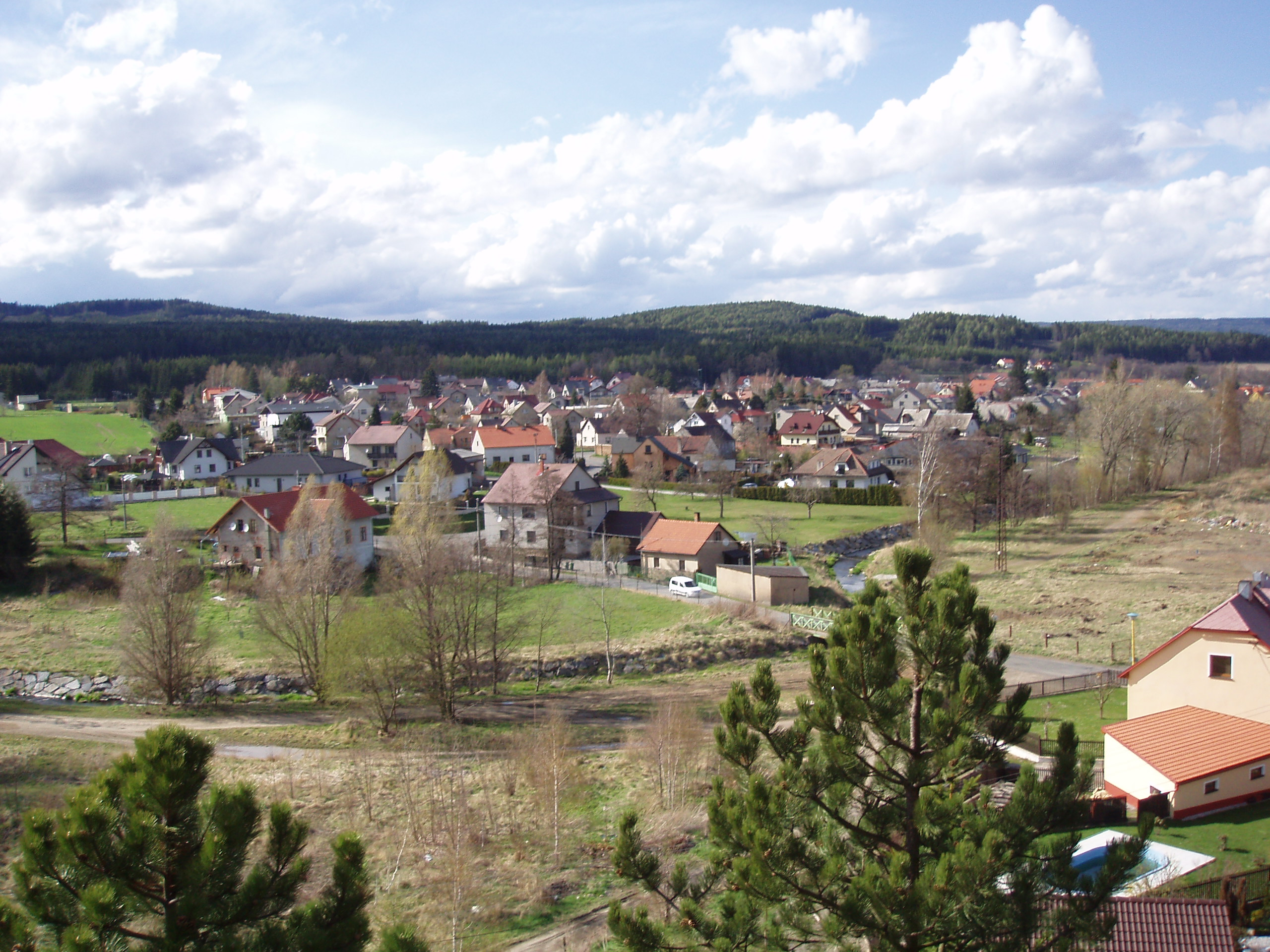 pohled od jihu